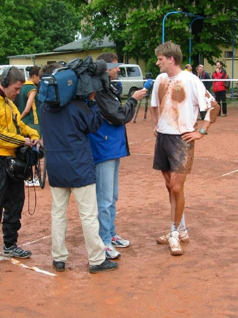 Interview mit dem Sieger beim International Masters 2002